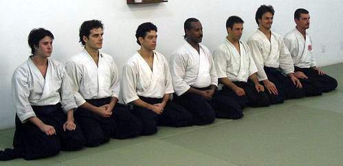 Aikido - Donovan 2006, lower half of image Aikido_Donovan_2006.jpg